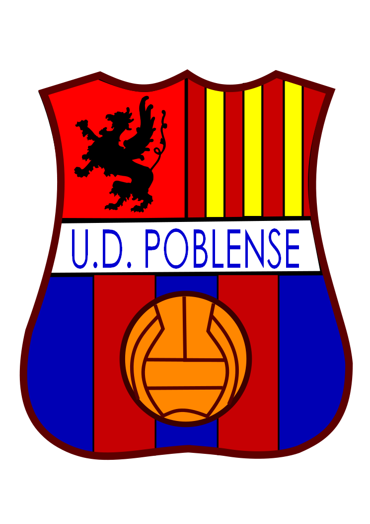 Antic escut de la UD Poblense